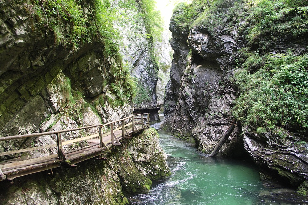 Vintgar-Klamm, Slovenia, river Radovna